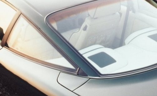 Roofline Aston Martin Virage